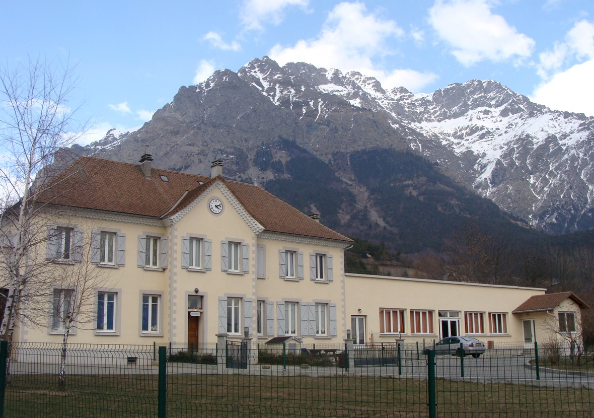 Les Costes (Hautes-Alpes), la mairie et la salle des fêtes, dominées par le Banc du Peyron, dont le sommet est le point le plus élevé de la commune.